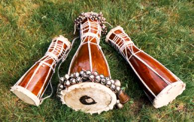 Bata drums (from left: Okónkolo, Iyá, Itótele)